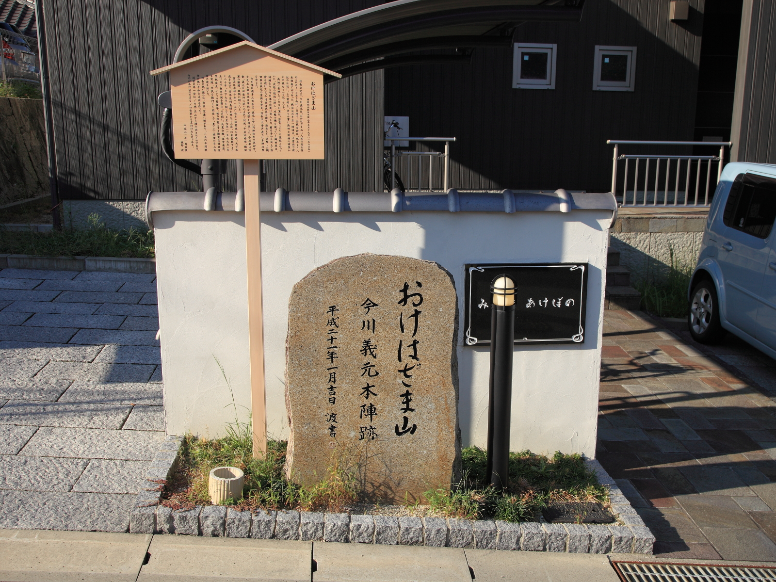 おけはざま山今川義元本陣跡（名古屋市緑区、2012年10月）